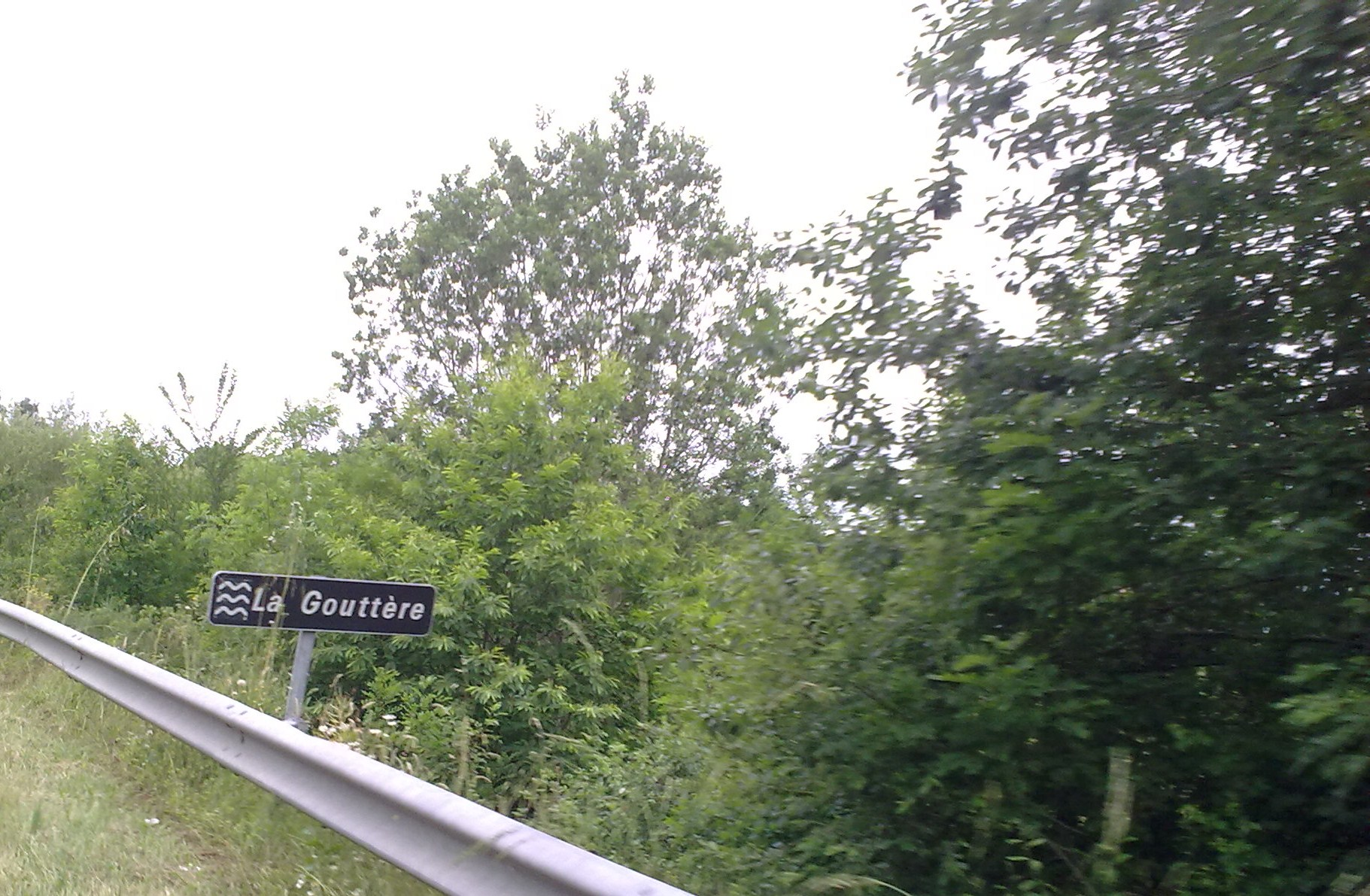 Morlaàs